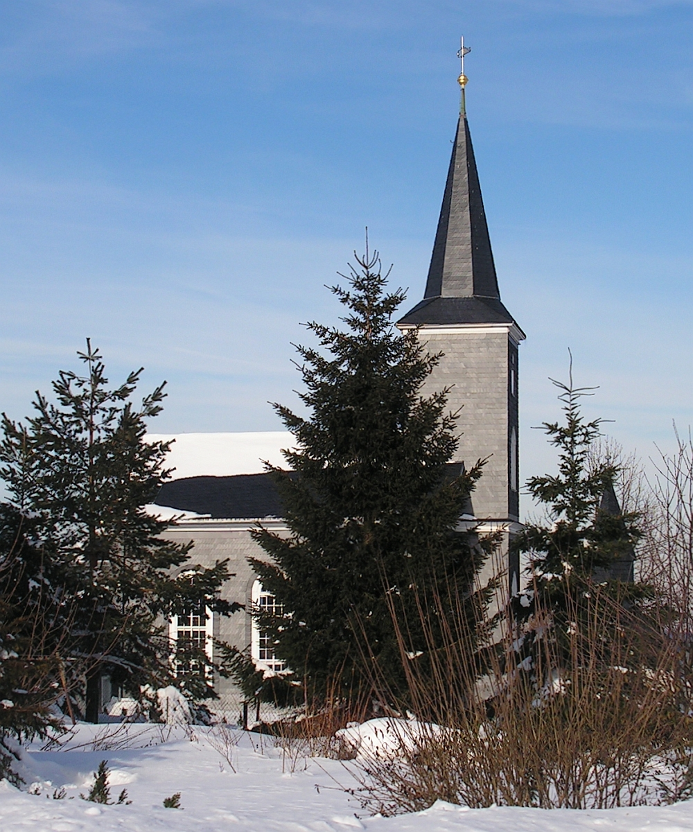 Masserberg Evangelische Bergkirche Foto 2005 Wolfgang Pehlemann Wiesbaden V0000315